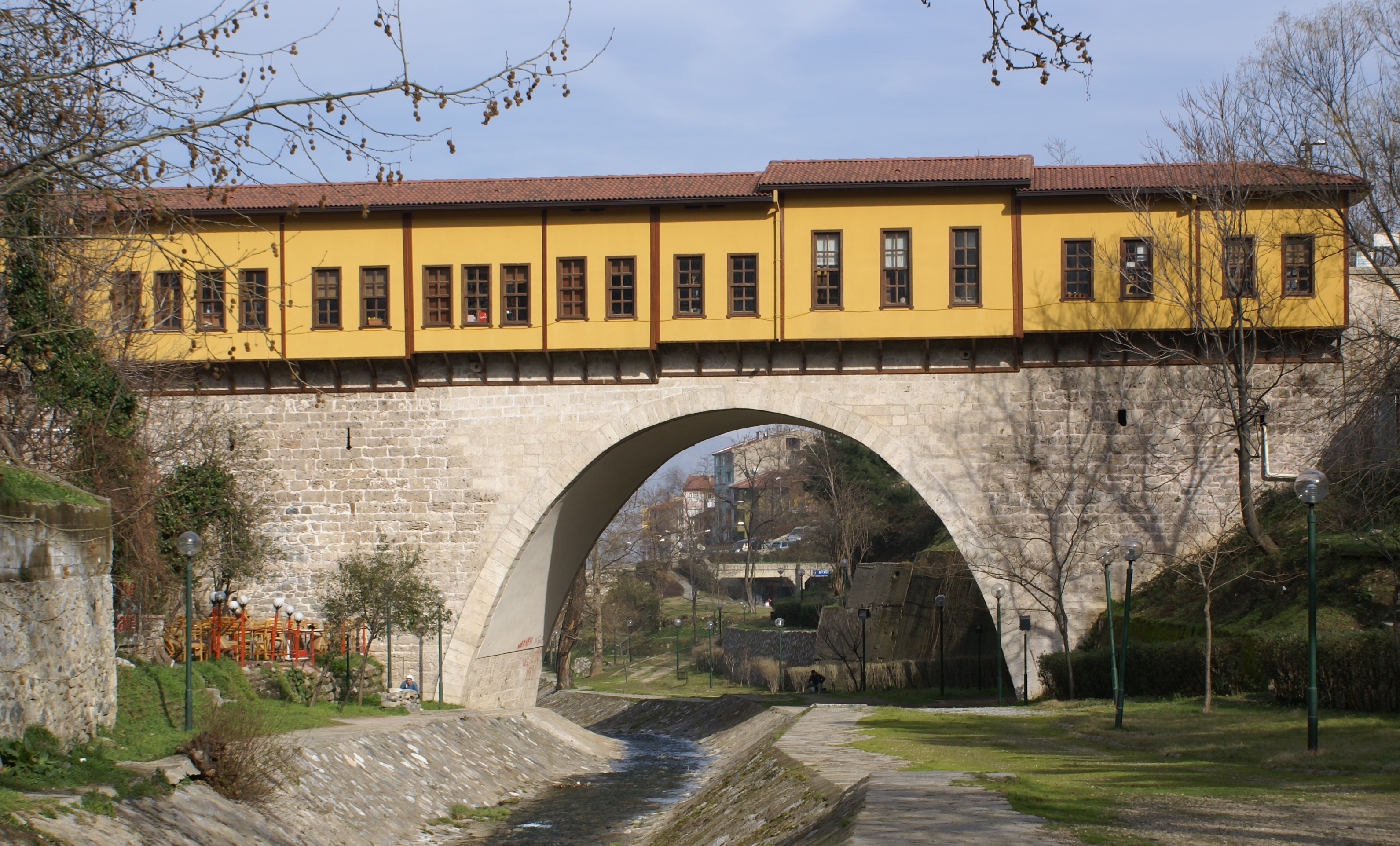 BURSA-IRGANDI KÖPRÜSÜ 2007